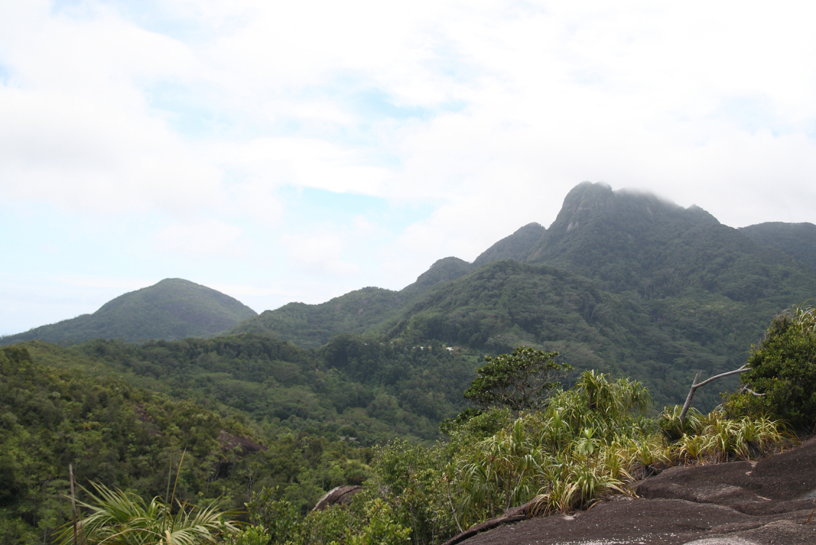 Morne Seychellois, Ile de Mahe